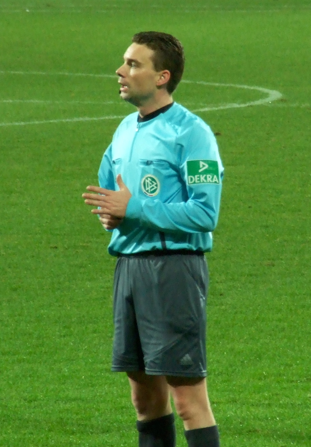 Schiedsrichter Guido Winkmann beim Fußballspiel Alemannia Aachen - Karlsruher SC